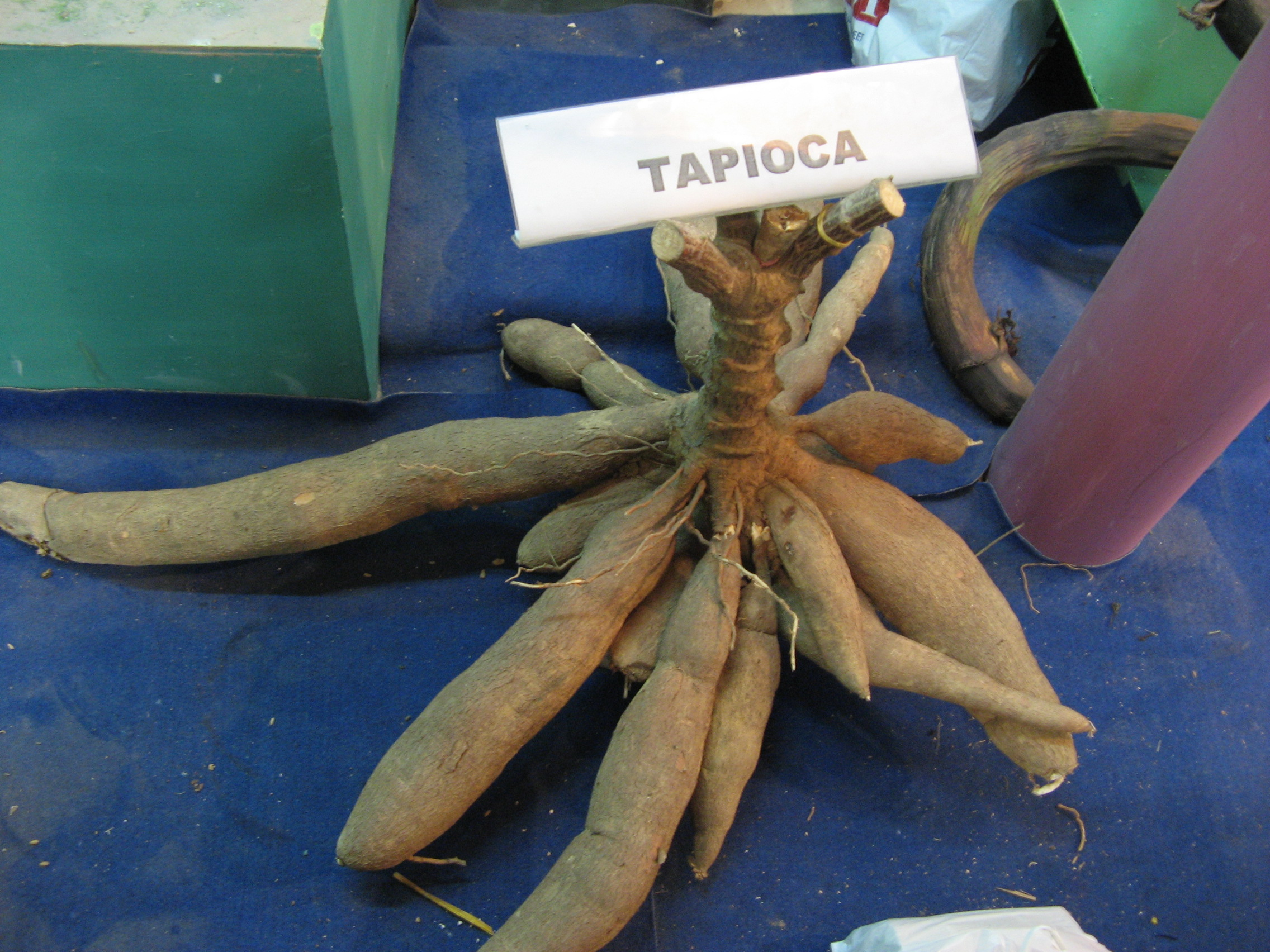 കൊള്ളിക്കിഴങ്ങ് ഡെൽഹിയിലെ ഐ.ഐ.ടി.എഫ്. 2008 ൽ കേരളത്തിന്റെ പവലിയനിൽ പ്രദർശിപ്പിച്ചിരിക്കുന്നു.